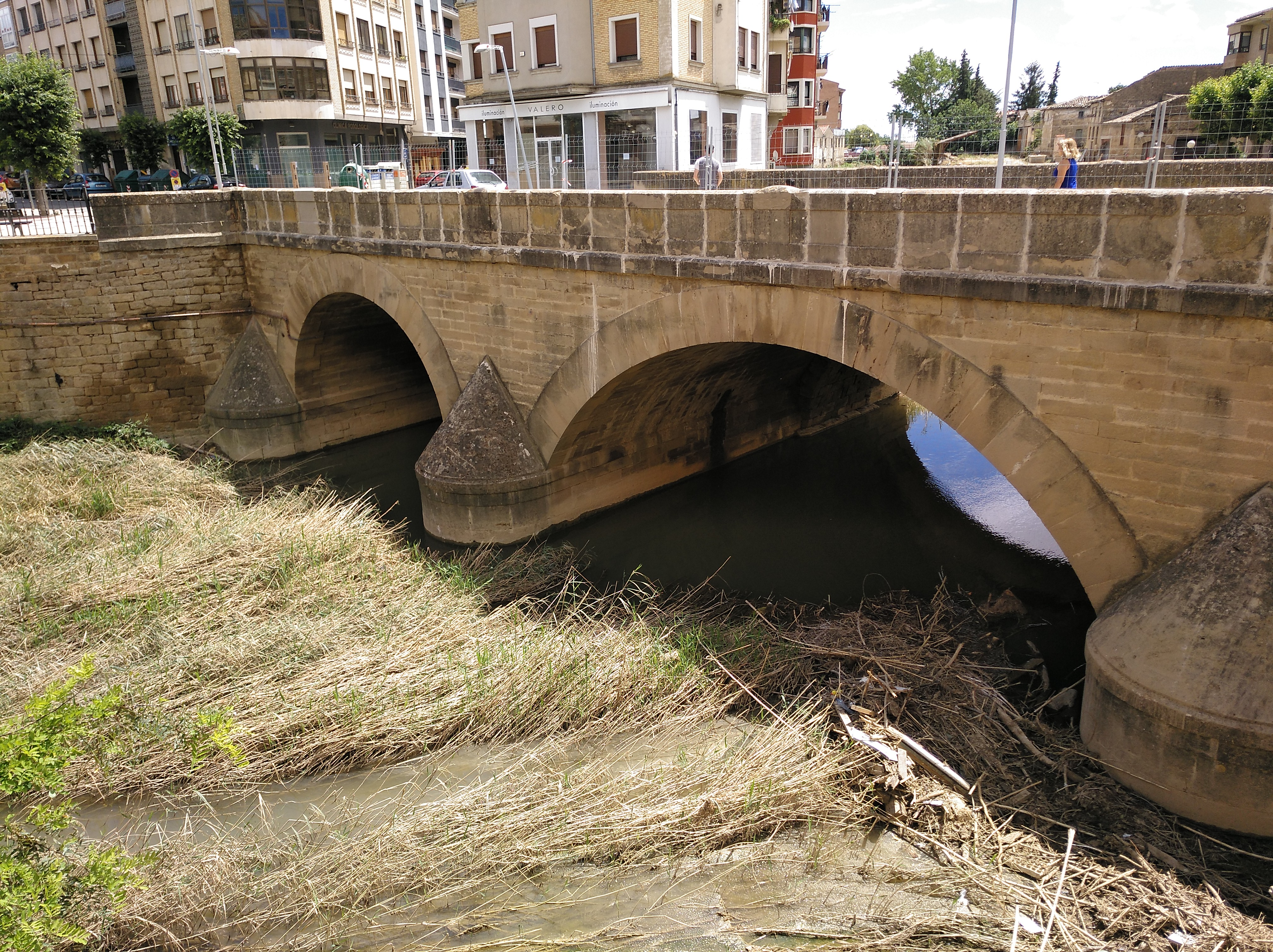 Zidakos ibaia Tafallako herrigunean zehar, 2019ko uztaileko uraldiaren ondoren, Nafarroa